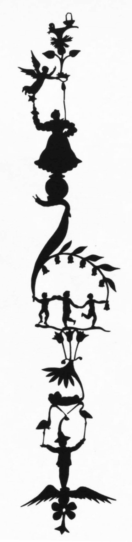 Luise Duttenhofer: Figurensäule mit Fortuna, schwarzer Scherenschnitt, Höhe 20,3 cm, Entstehungsjahr unbekannt, Marbach, Deutsches Literaturarchiv, Inventarnummer 5678.